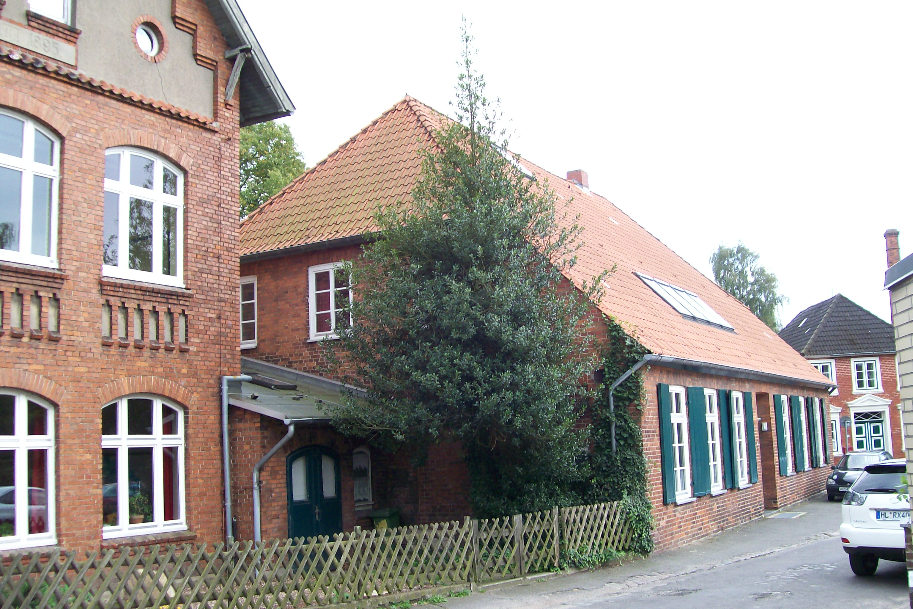 Gebäude der Integrierten Gesamtschule in Lübeck-Schlutup, Kirchstraße, benannt nach Willy Brandt